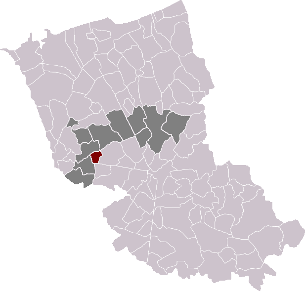 Locatie gemeente Broksele in arrondissement Duinkerke. Zelfgemaakt. Location of Broxeele municipality in the arrondissement of Dunkirk. Self made. Localisation de la commune de Broxeele dans l'arrondissement de Dunkerque. Fait moi-même.